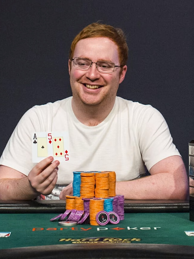 Niall Farrell nach seinem Sieg beim Main Event der partypoker WPT Caribbean